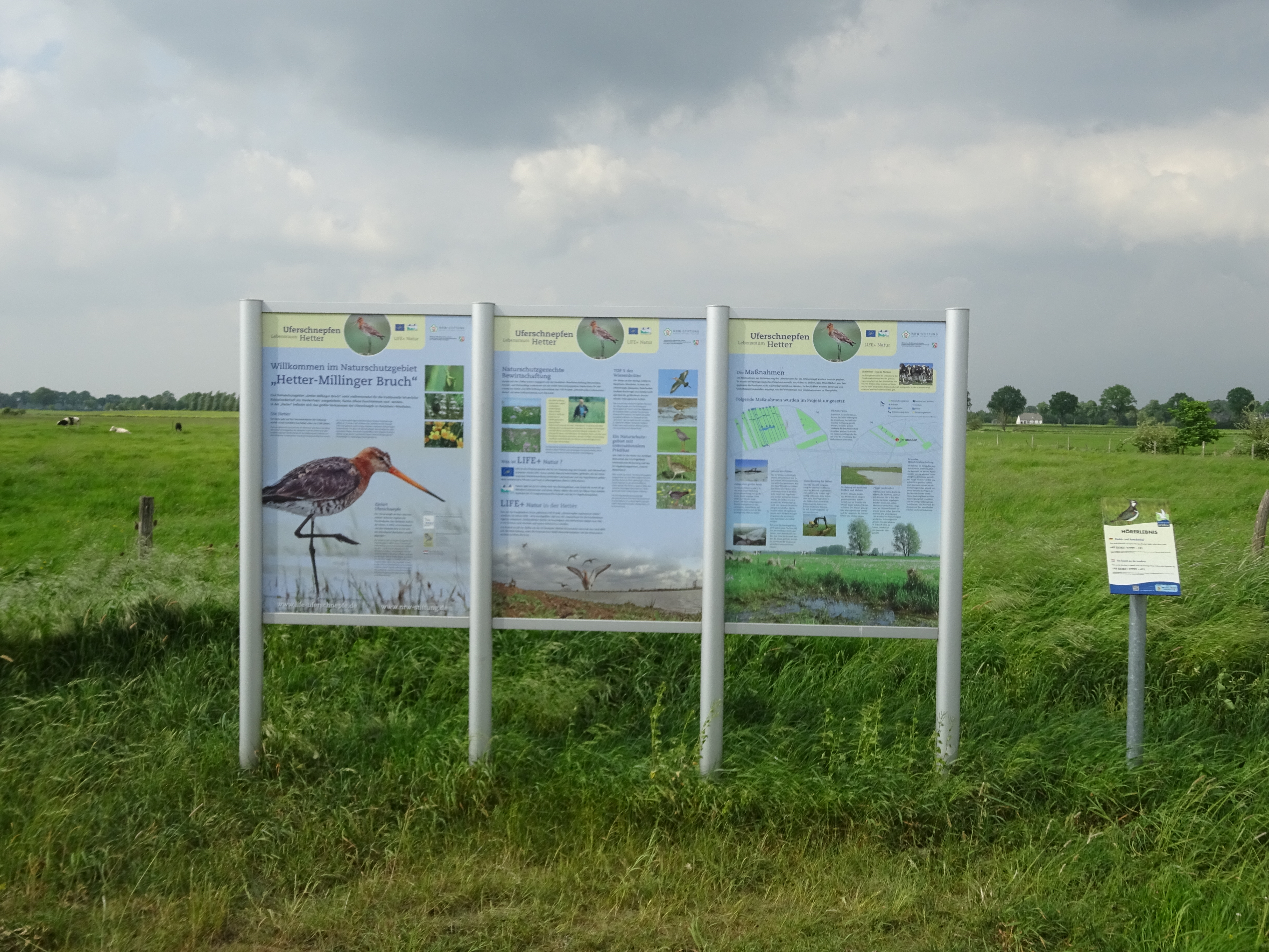 Naturschutzgebiet Hetter-Millinger Bruch, Emmerich am Rhein; Holländerdeich